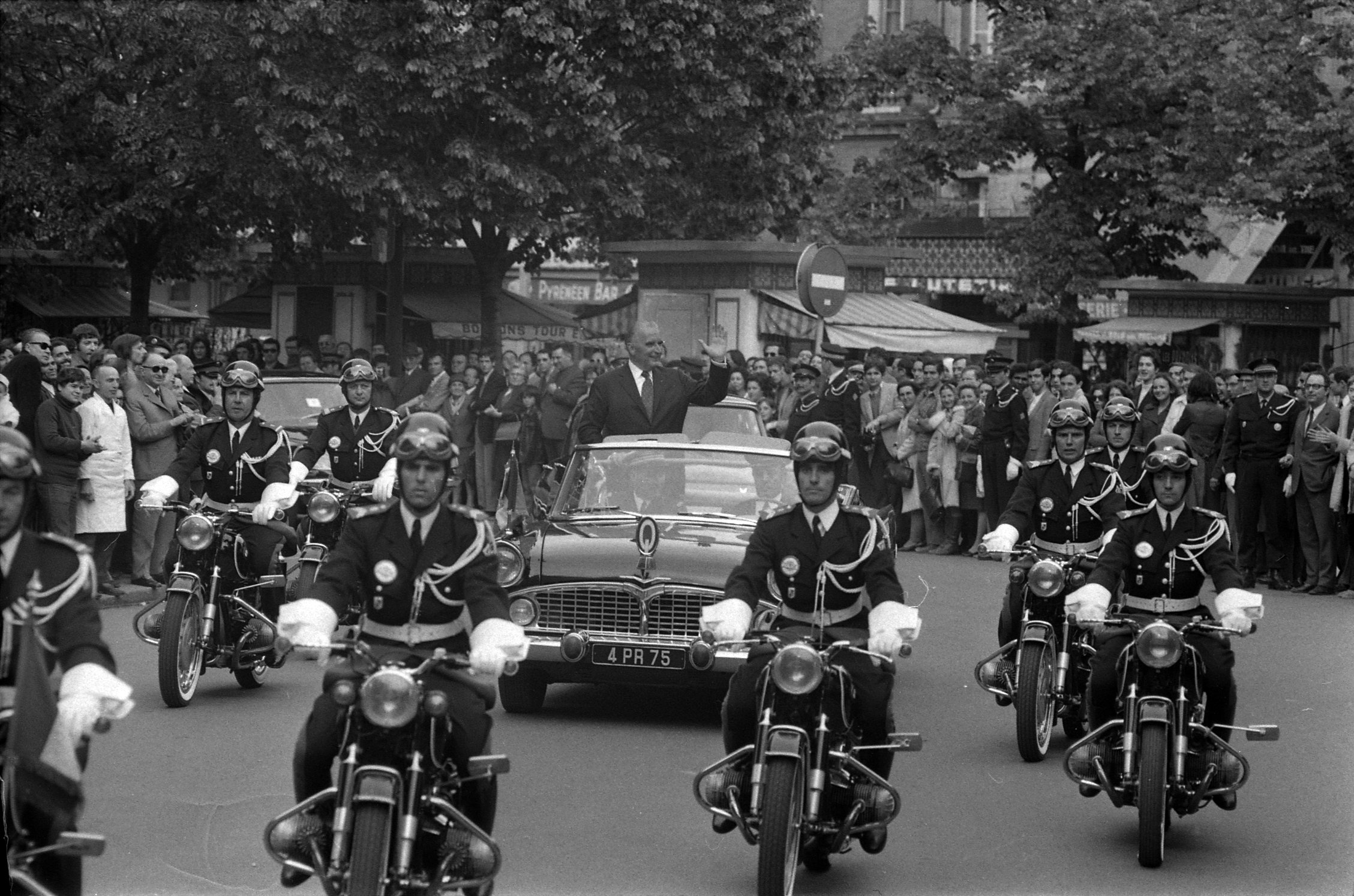 Allées du Président-Franklin-Roosevelt. 7 mai 1971. Vue du convoi présidentiel sur les allées à l'occasion du voyage de Georges Pompidou, Président de la république, à Toulouse.